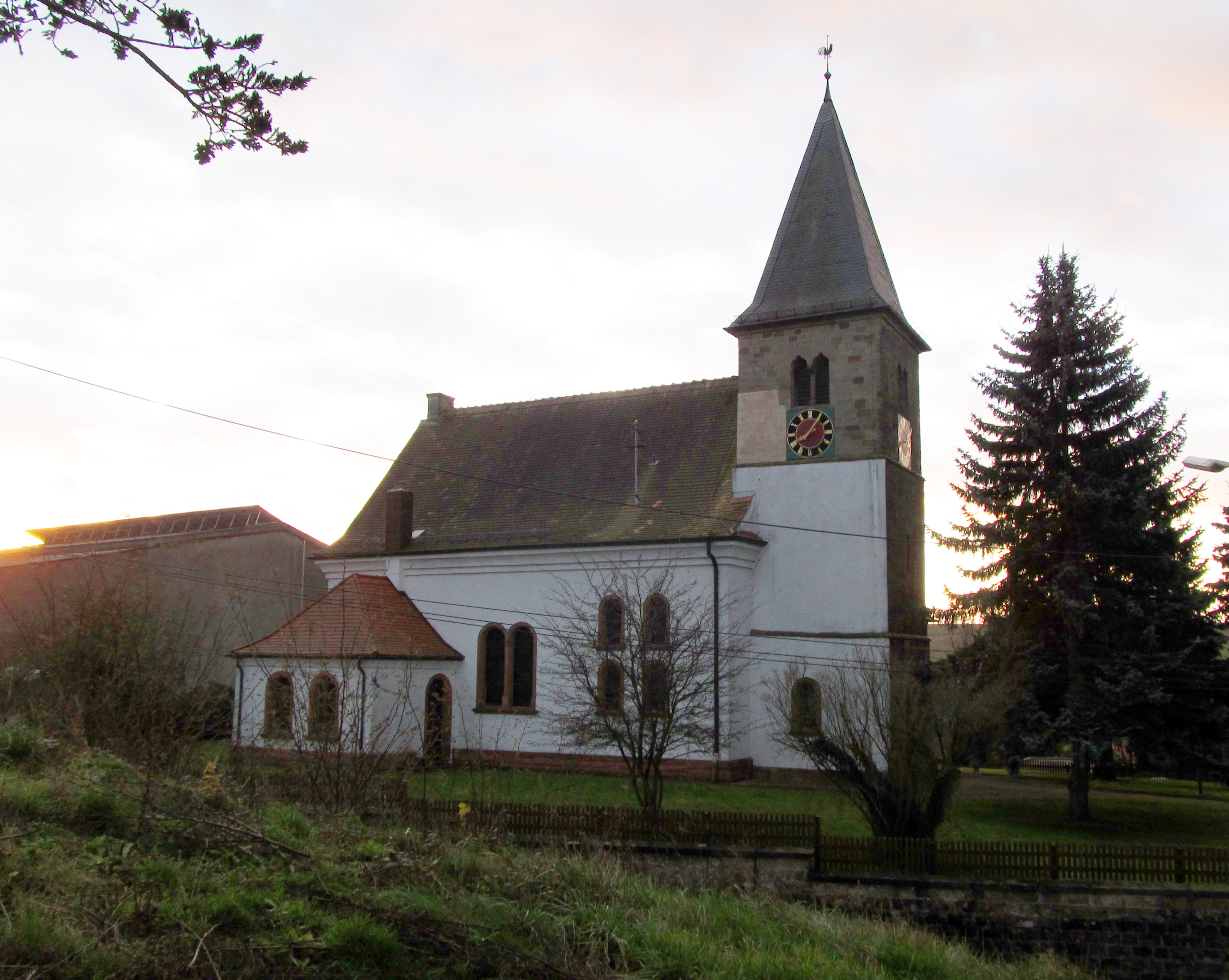 Die protestantische Kirche in Brenschelbach, Saarland